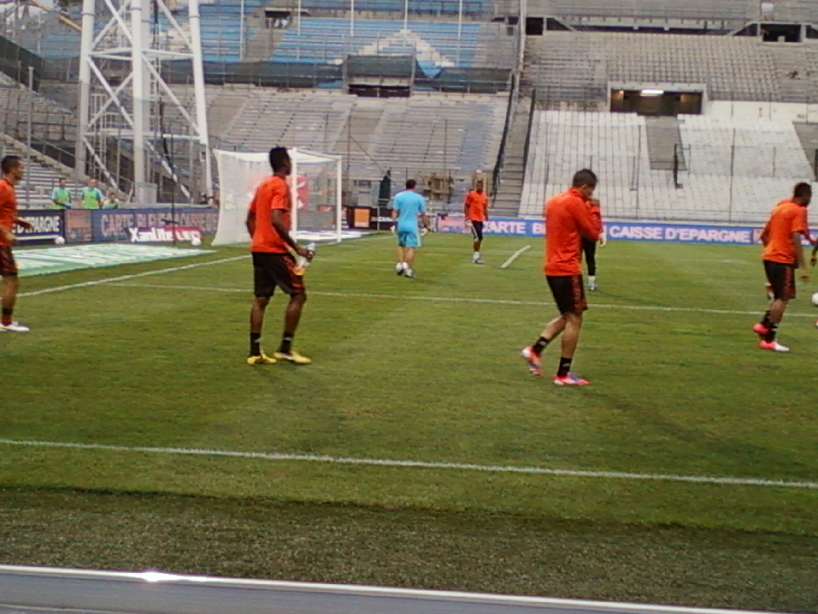 Nicolas N'koulou lors de l'entrée dans le stade Vélordrome pour l'échauffement.